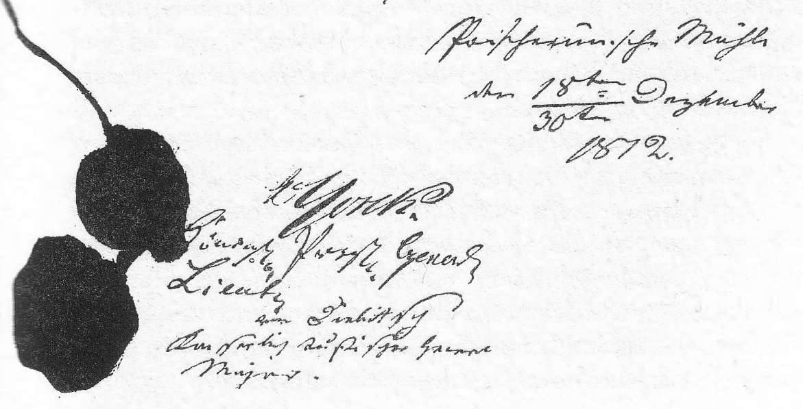 Unterschriften der Generäle Yorck und Diebitsch unter der Konvention von Tauroggen vom 30.12.1812